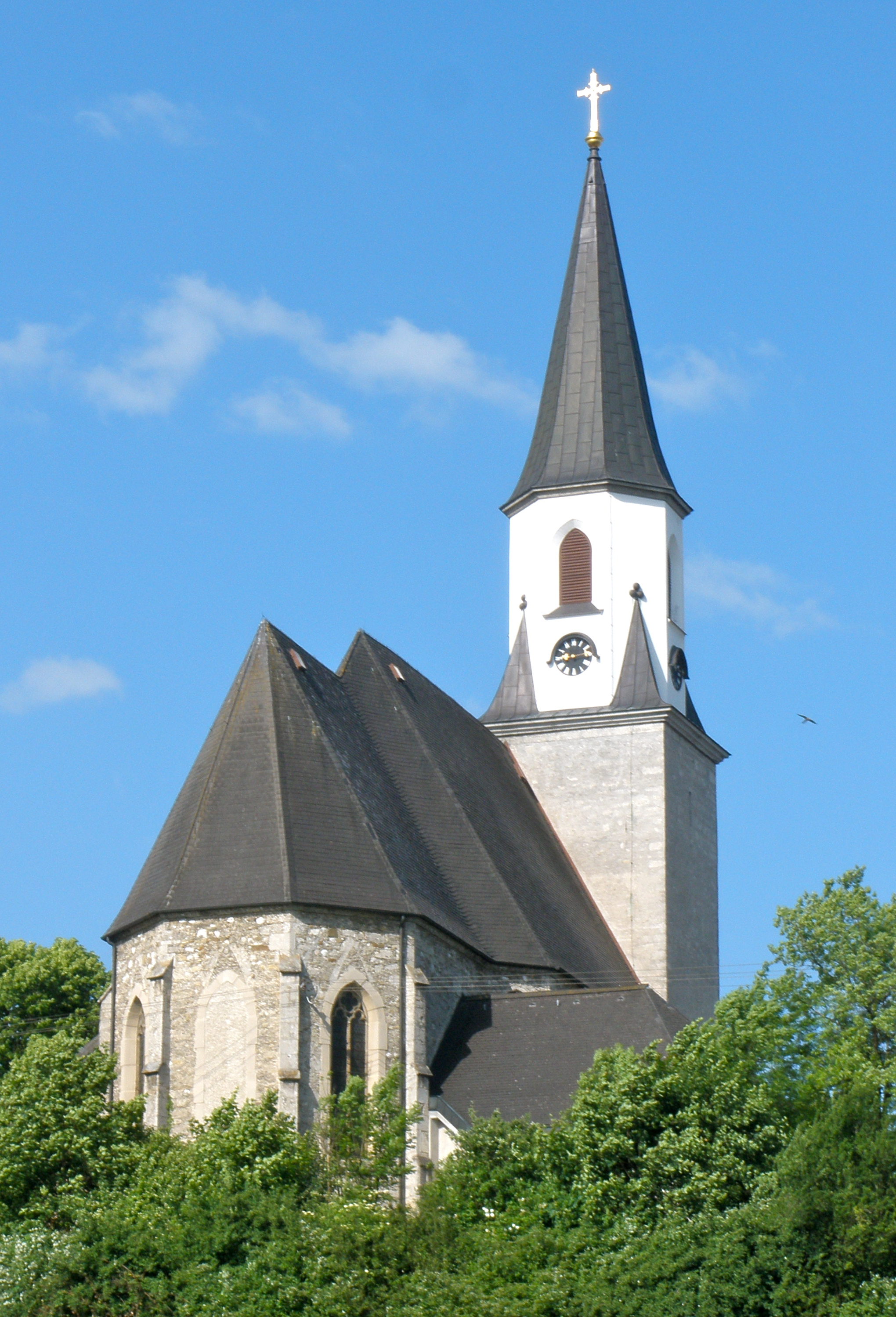 Die katholische Pfarrkirche in Ohlsdorf ist dem heiligen Martin geweiht und im spätgotischen Stil erbaut. Mittelpunkt des barocken Hochaltars ist das Altarbild "Maria Gravida", das die Gottesmutter in schwangerem Zustand zeigt.